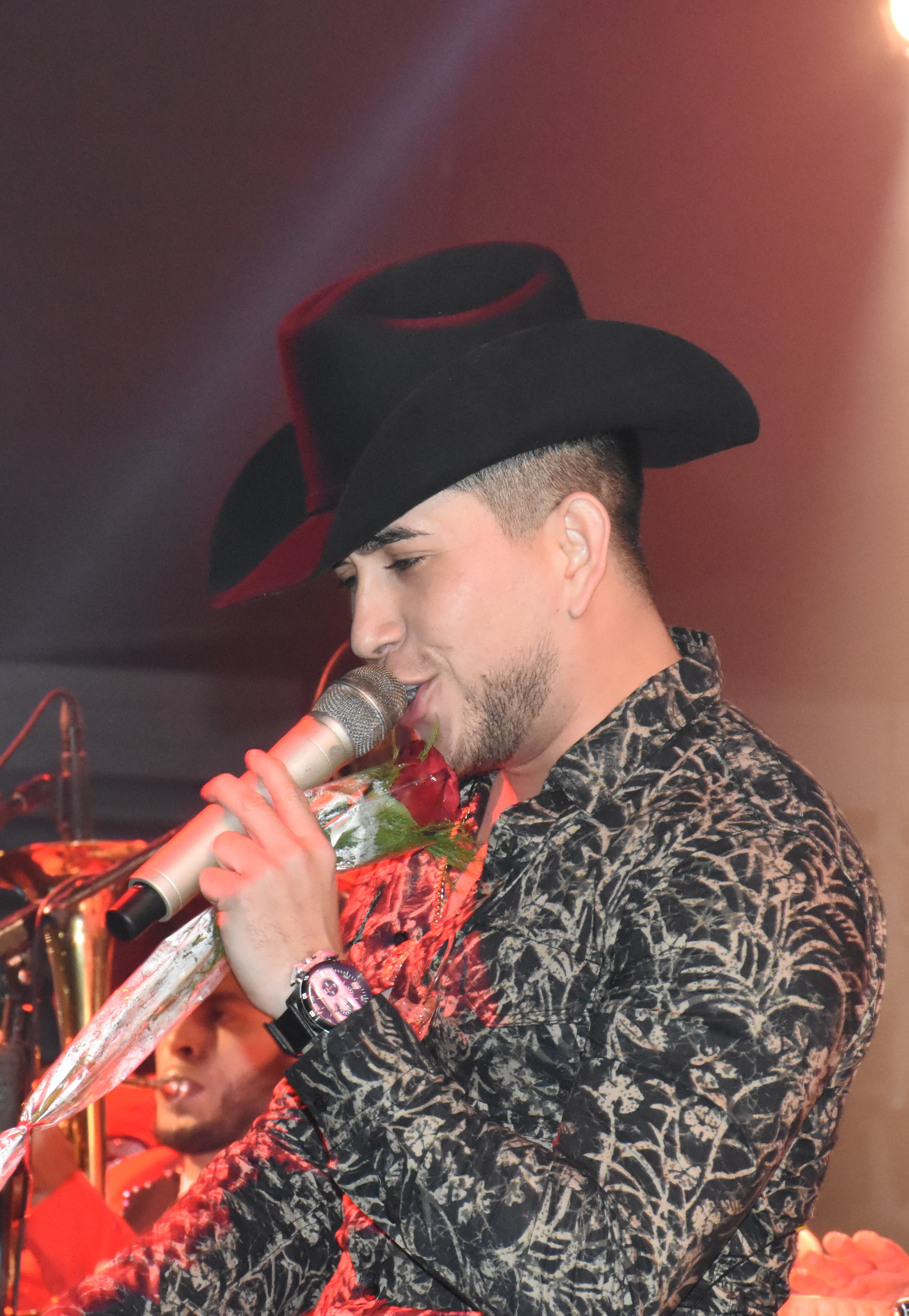 Desarrollo del concierto del Bebeto, en el palenque.